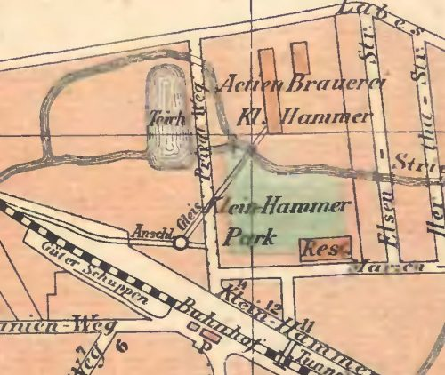 Stacja kolejowa Gdańsk Wrzeszcz i okolica.